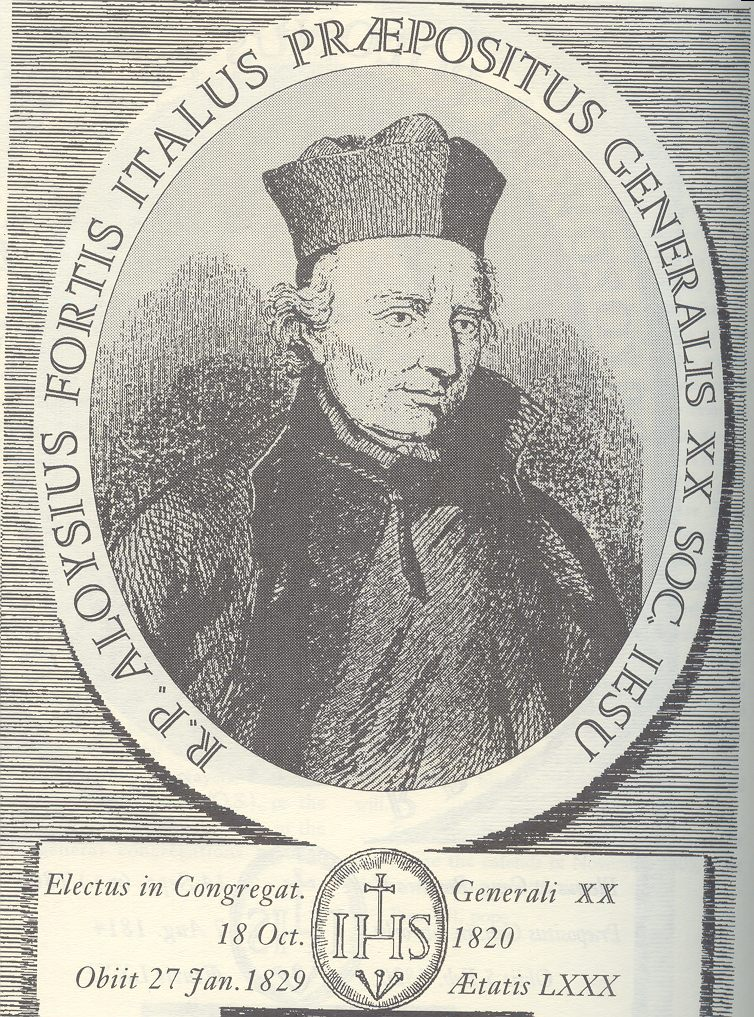 Gravure de Luigi Fortis, 20ème Supérieur Général de la Compagnie de Jésus